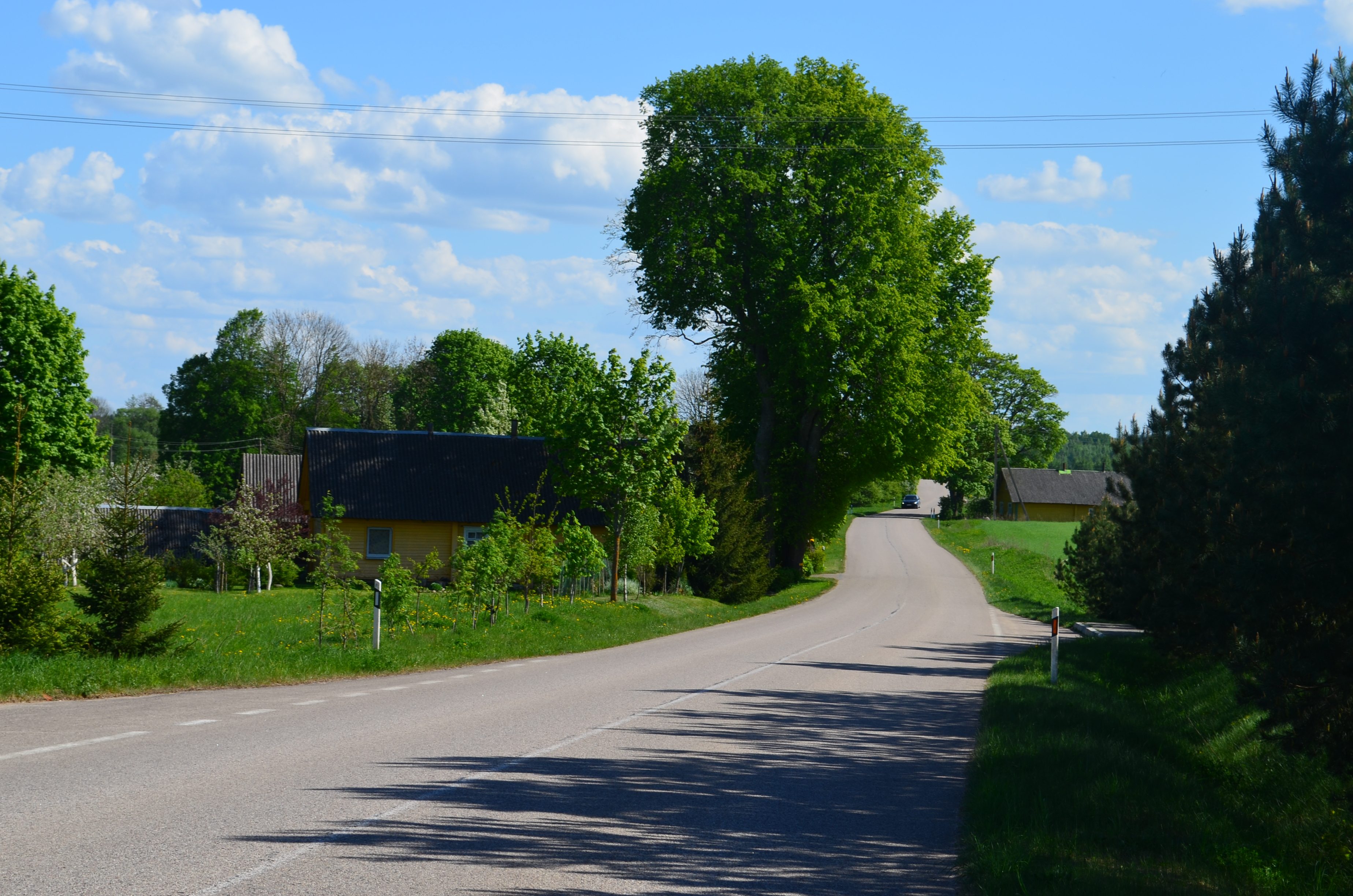 Gruodžiai, Balninkų sen., Molėtų raj.